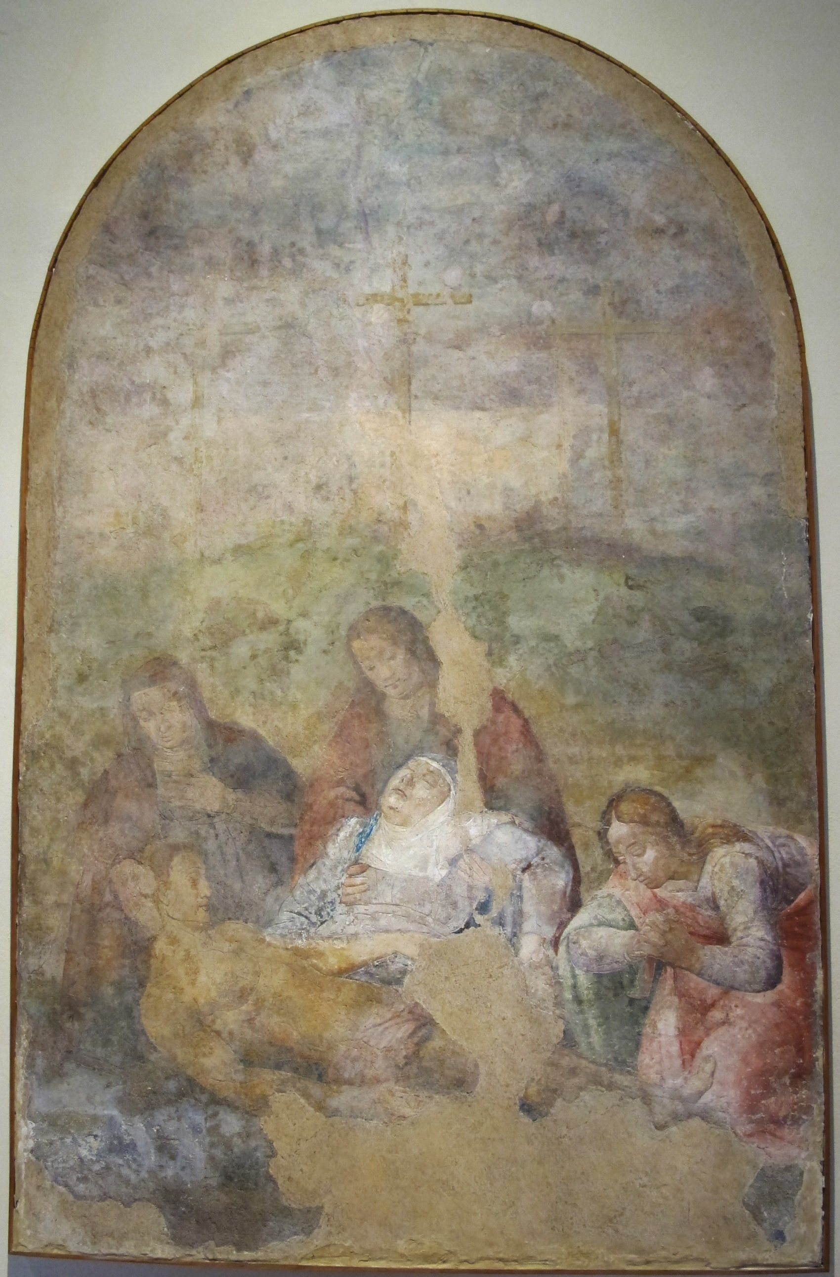 Museo Nazionale d'Arte Medievale e Moderna - MIBAC This is a photo of a monument which is part of cultural heritage of Italy.